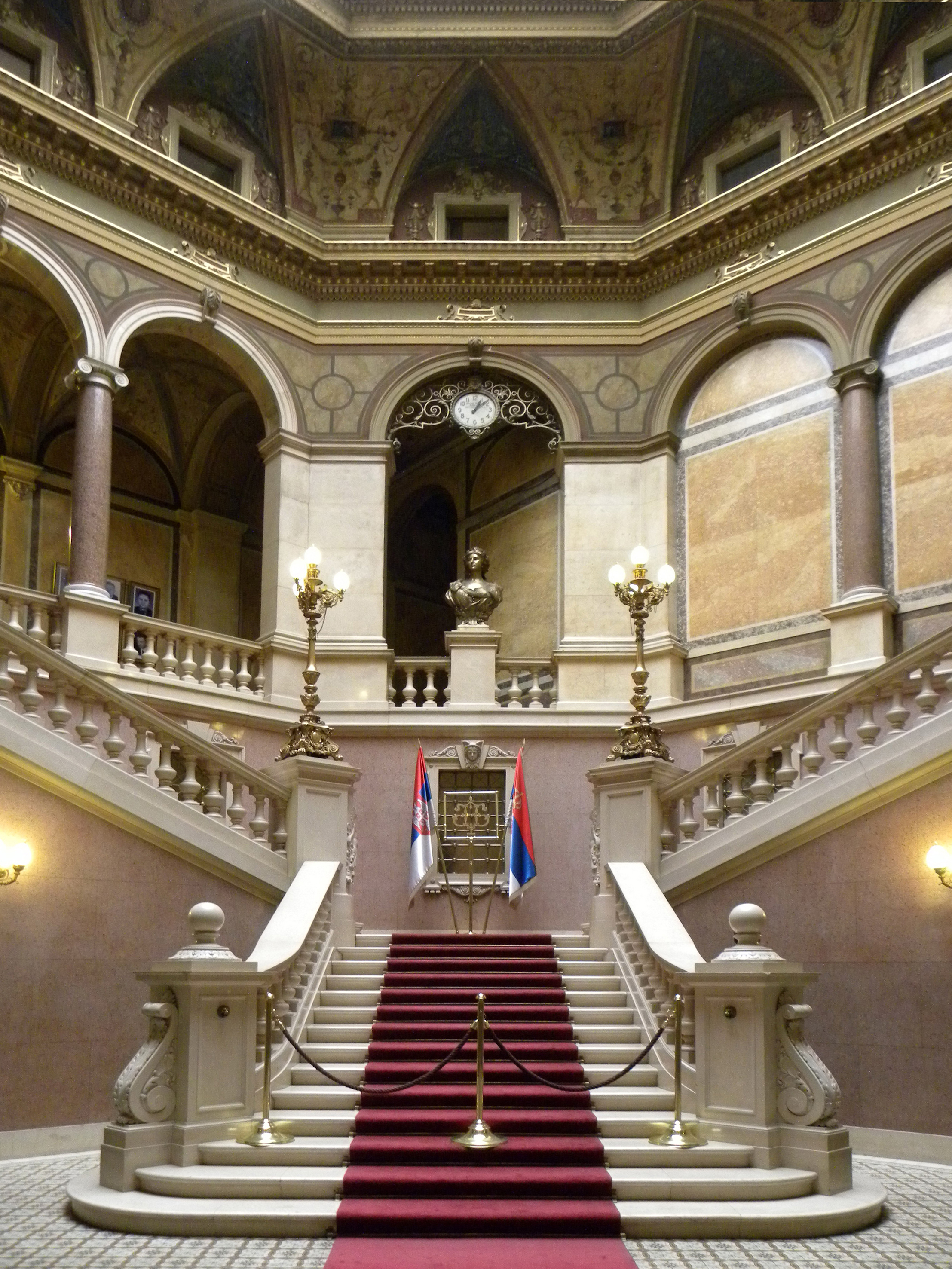 Beograd Narodna banka Srbije Kralja Petra 12